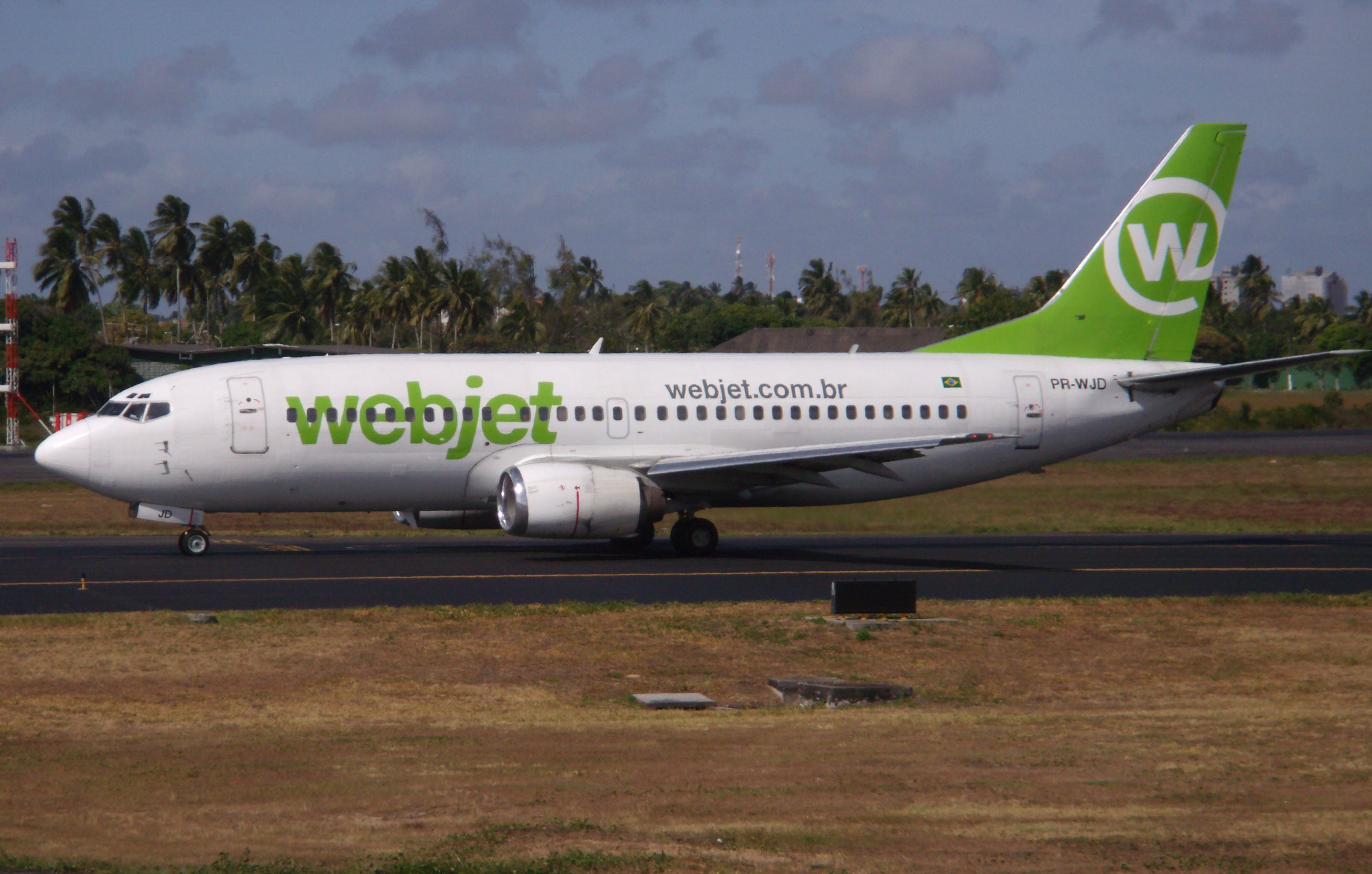 Boeing 737-300 (WebJet Linhas Aéreas) no Aeroporto Internacional "Deputado Luís Eduardo Magalhães" em Salvador, Bahia.